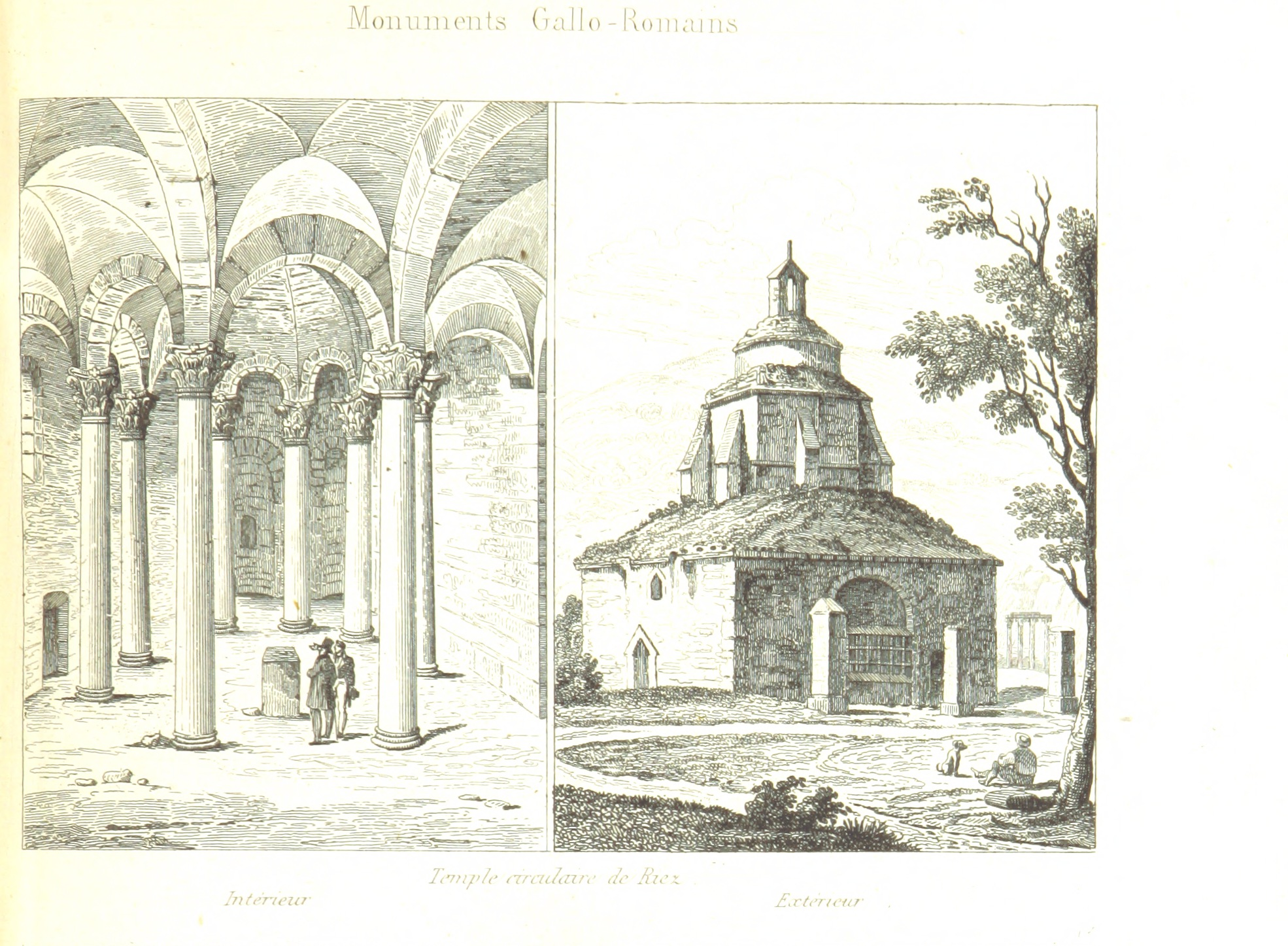 "Intérieur et extérieur du temple circulaire de Riez", gravure de la "France historique monumentale" de Jean-Abel Hugo (1836)